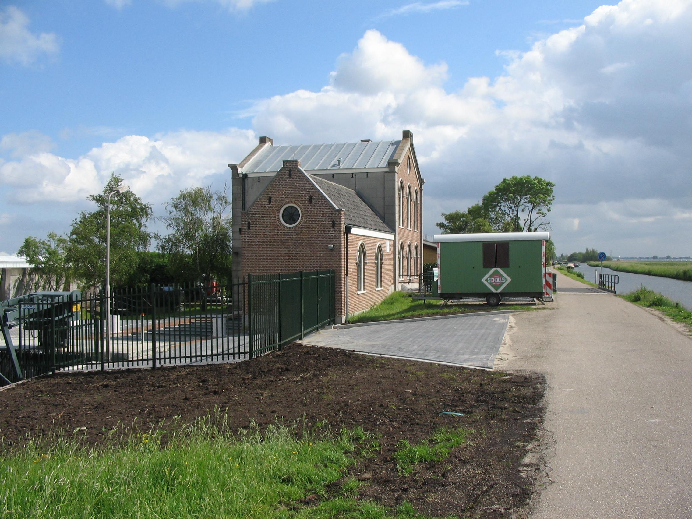 Gemaal Oude en Nieuwe Broekpolder in Kwintsheul uit 1880, gemeente Westland, provincie Zuid-Holland (Nederland)